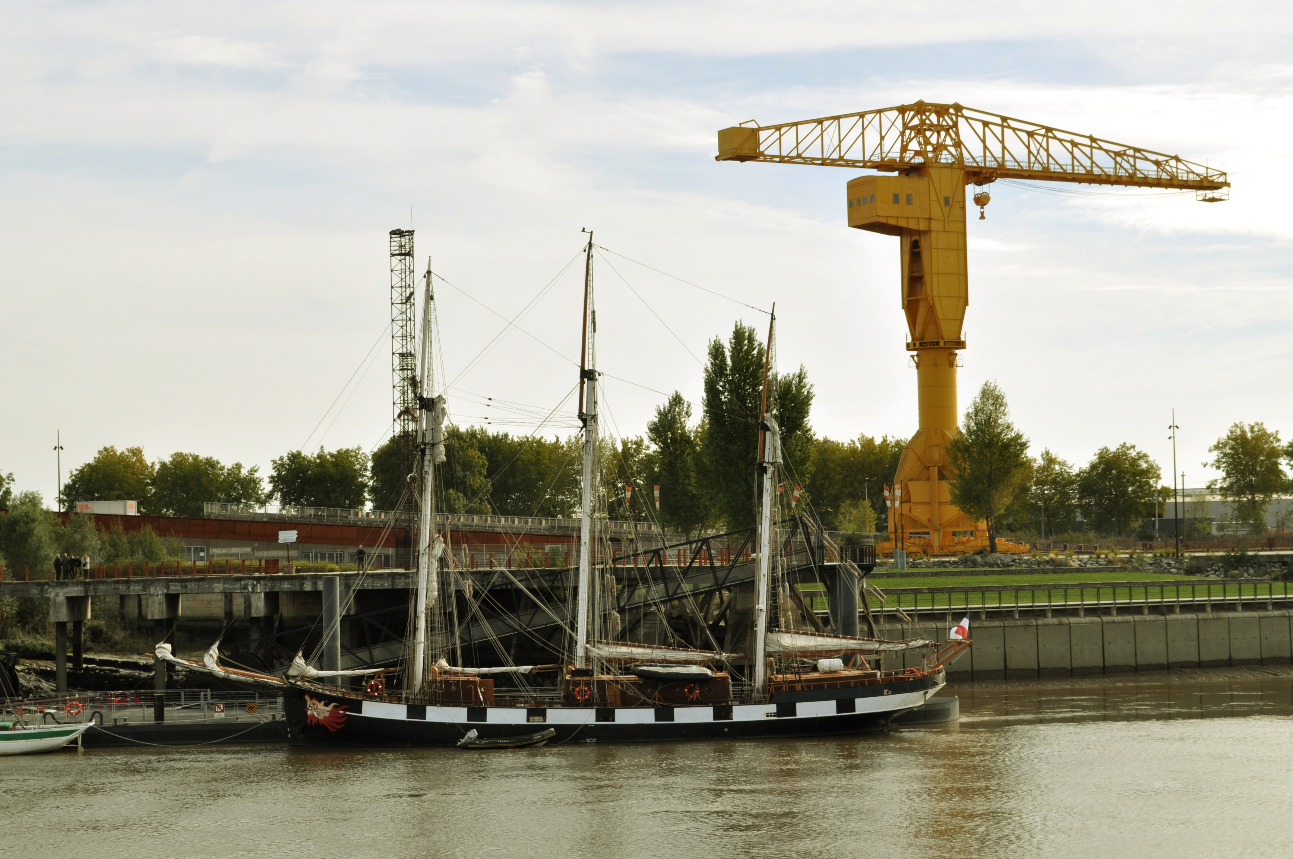 Ar vag La Boudeuse e Naoned.